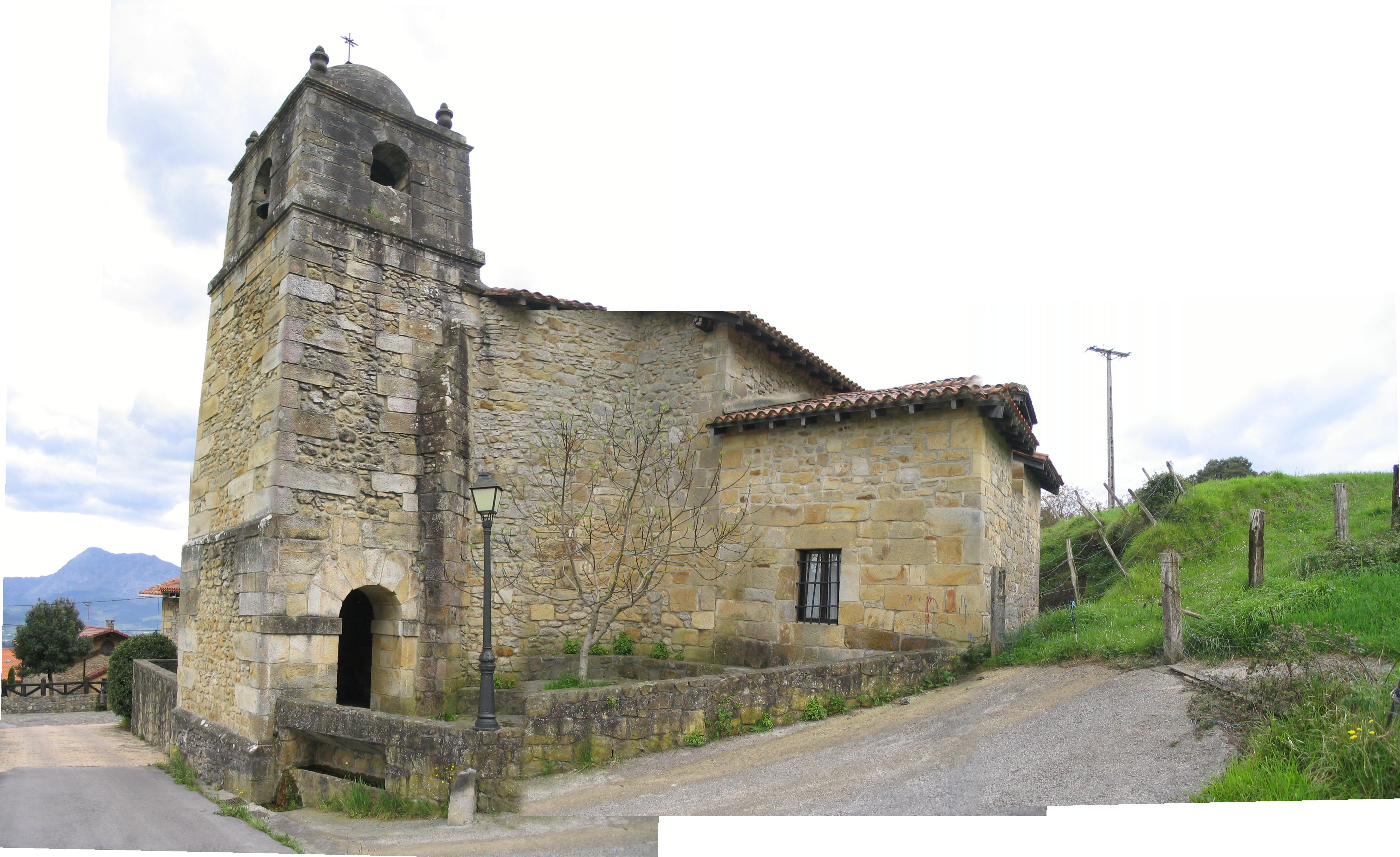 Eleiza Barri. Garai (Bizkaia)